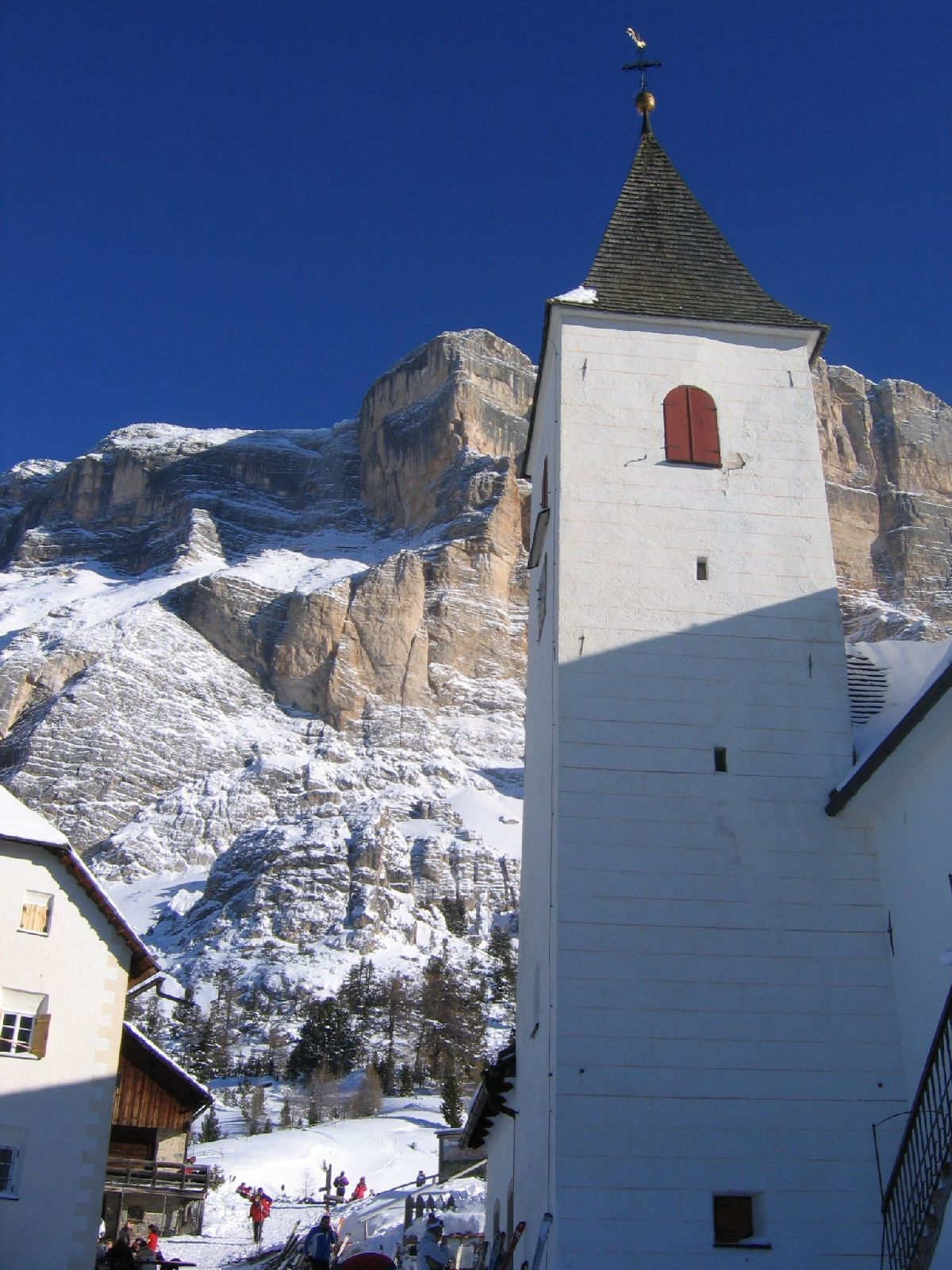 Santa Croce Church (Alta Badia) - Santa Croce Peak 2999m